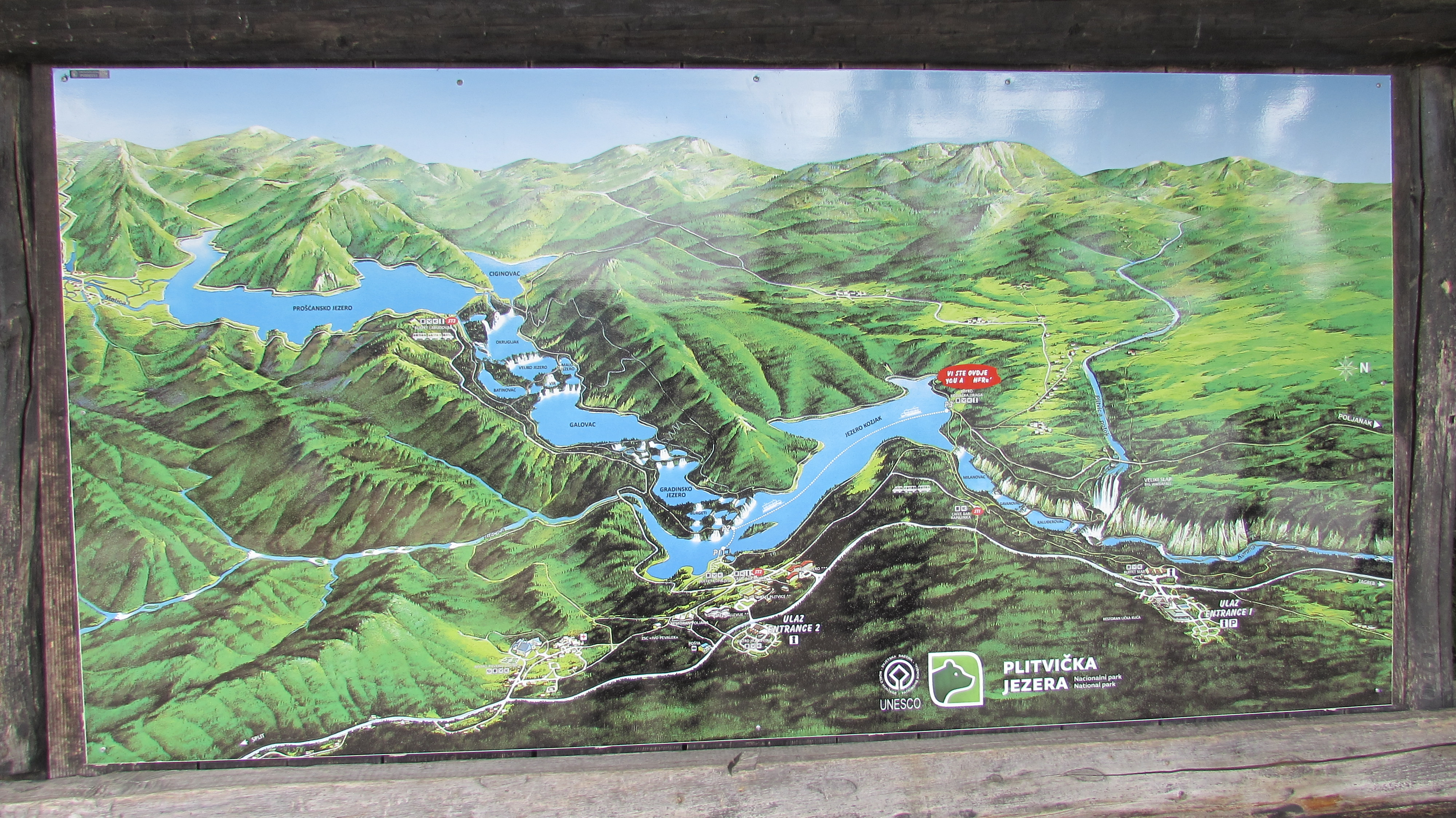 PlitvicerSeenPlakat